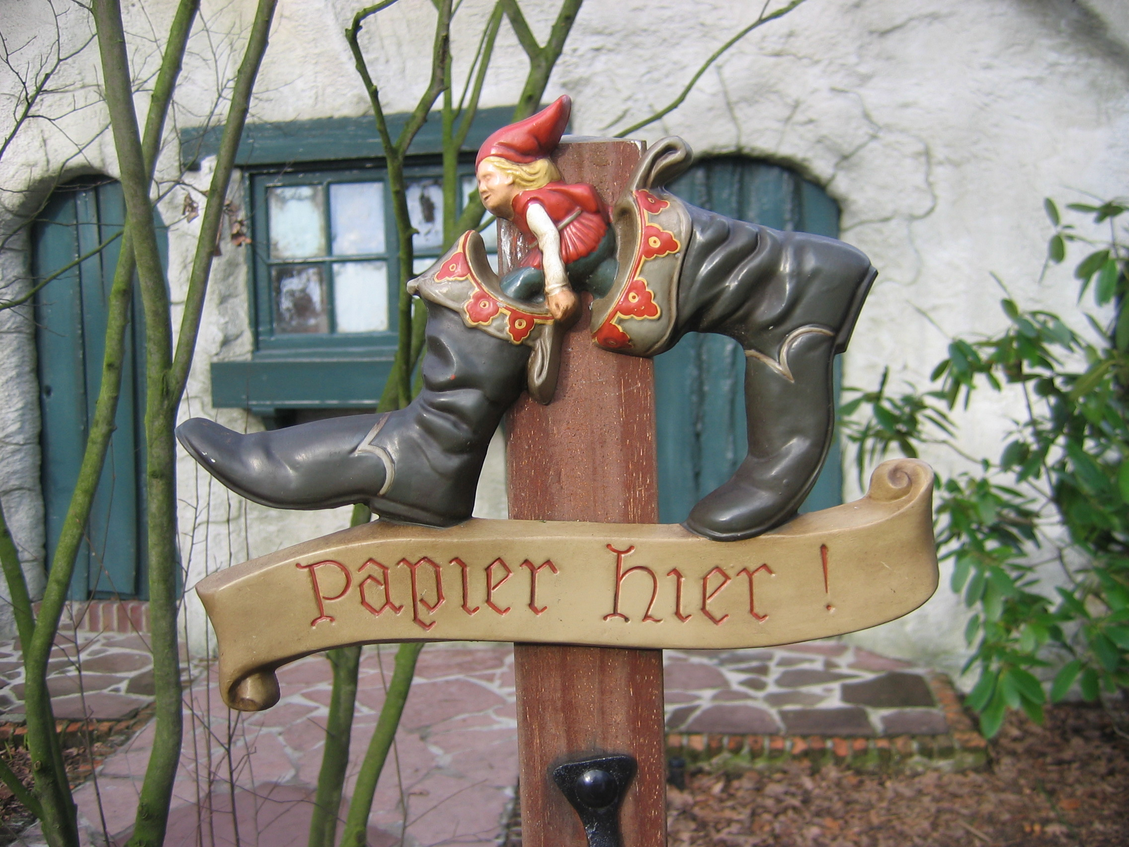 Papier Hier-sign in Efteling